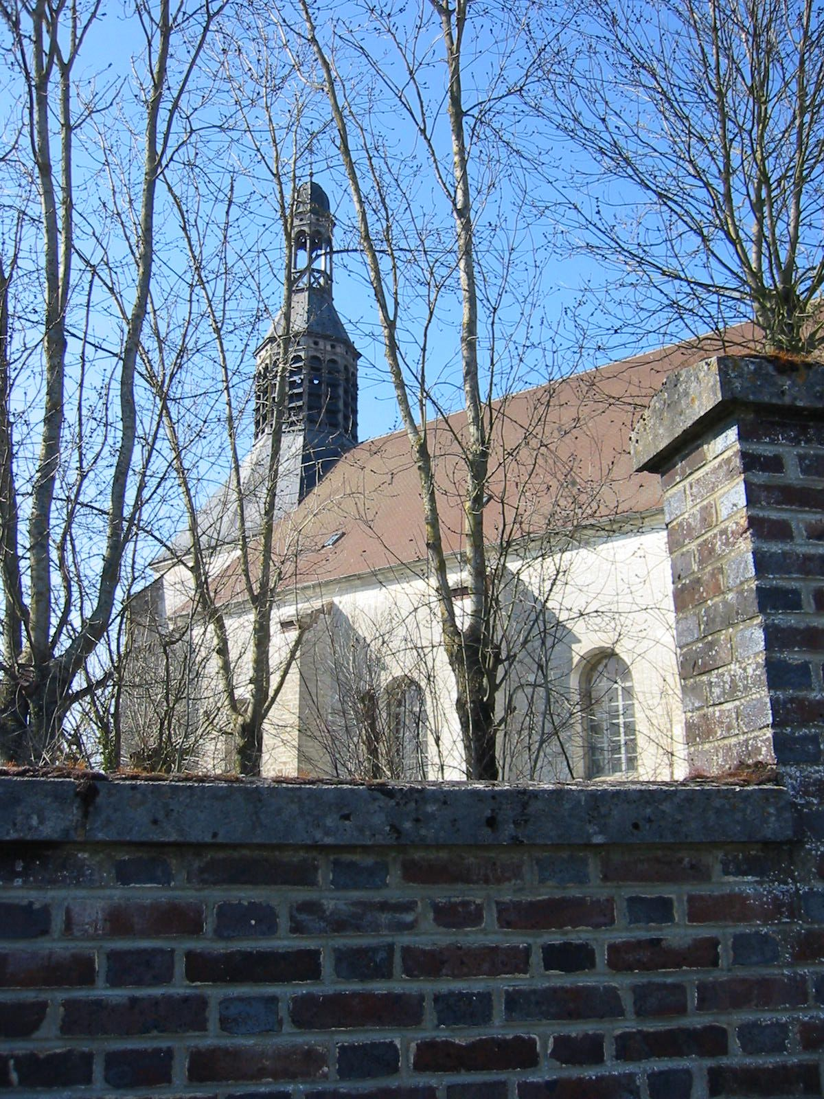 Clocher de Saint Mards en Othe vu depuis le cimetière